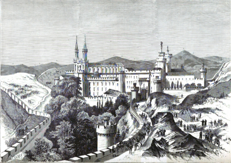 Le couvent des prémontrés cerné par les troupes. Dessin de M. Schuwer, correspondant de l'Illustration. Le positionnement des dragons postés en vedette sur les crêtes (tous les 250 mètres) est figuré par des croix.